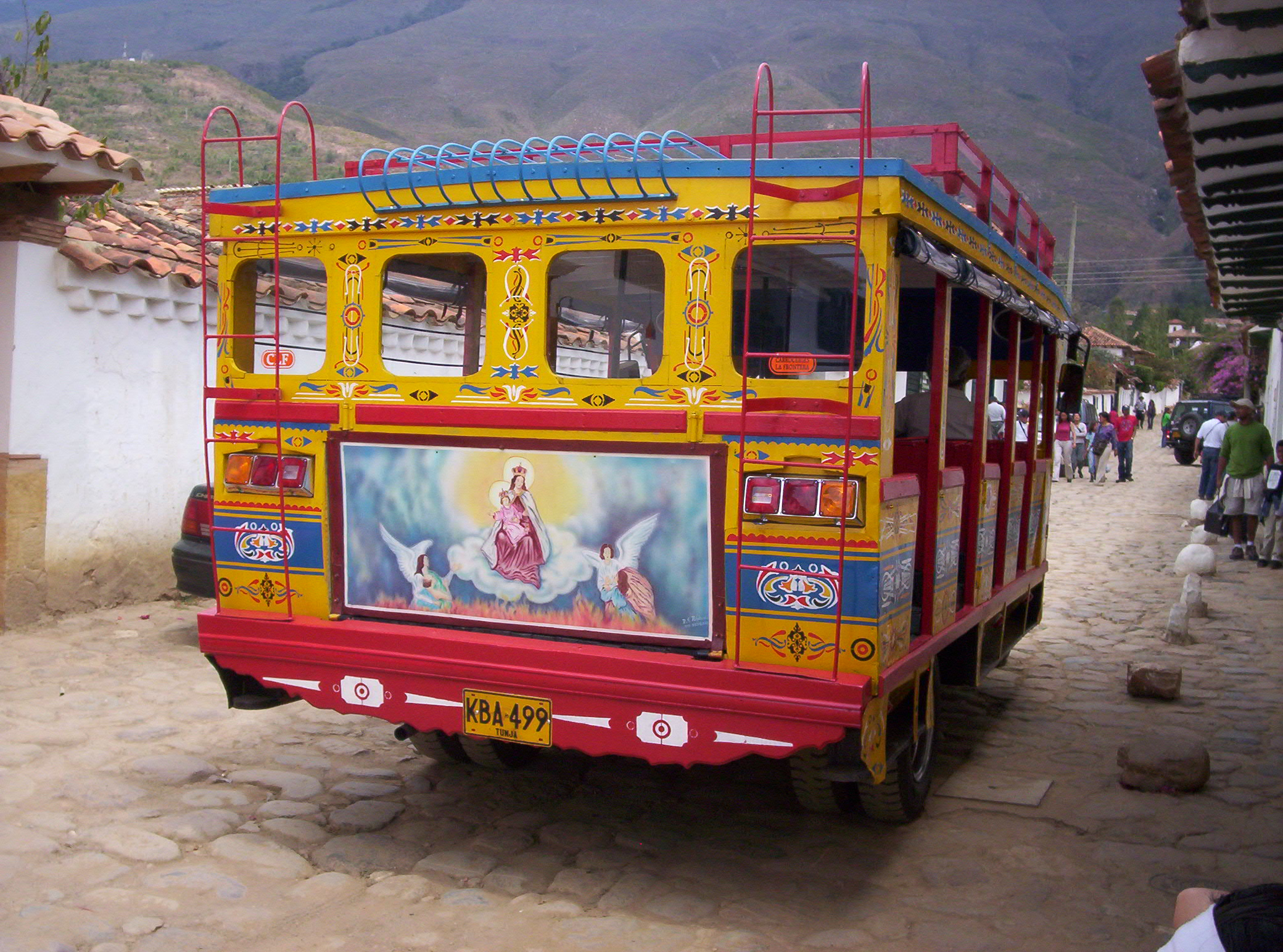 Vista posterior de una Chiva, bus Colombiano usado como transporte turístico. La foto fue tomada en la ciudad de Villa de Leyva (Boyacá, Colombia).